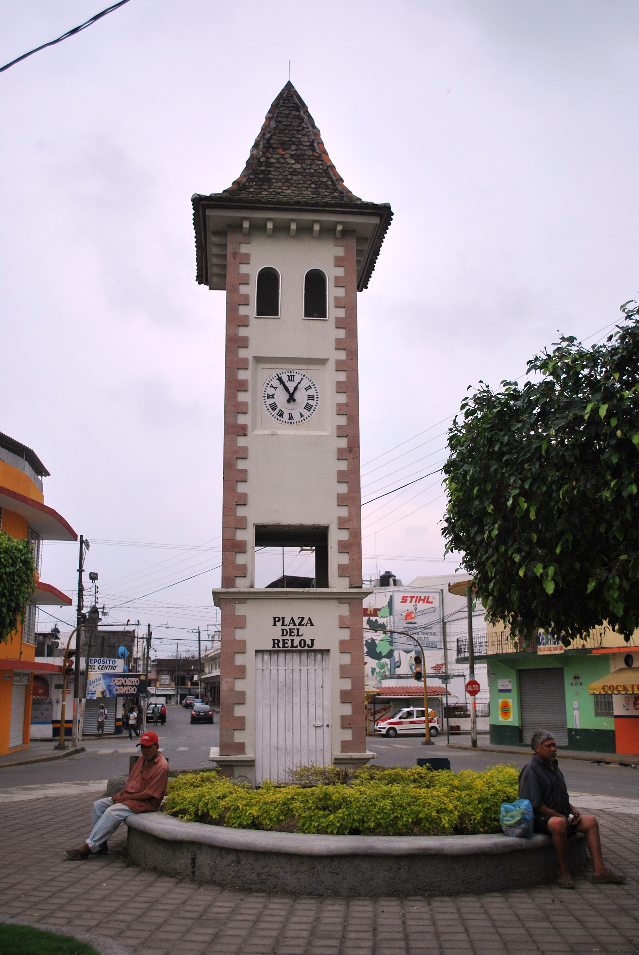 Clock Tower in San Rafael, Veracruz